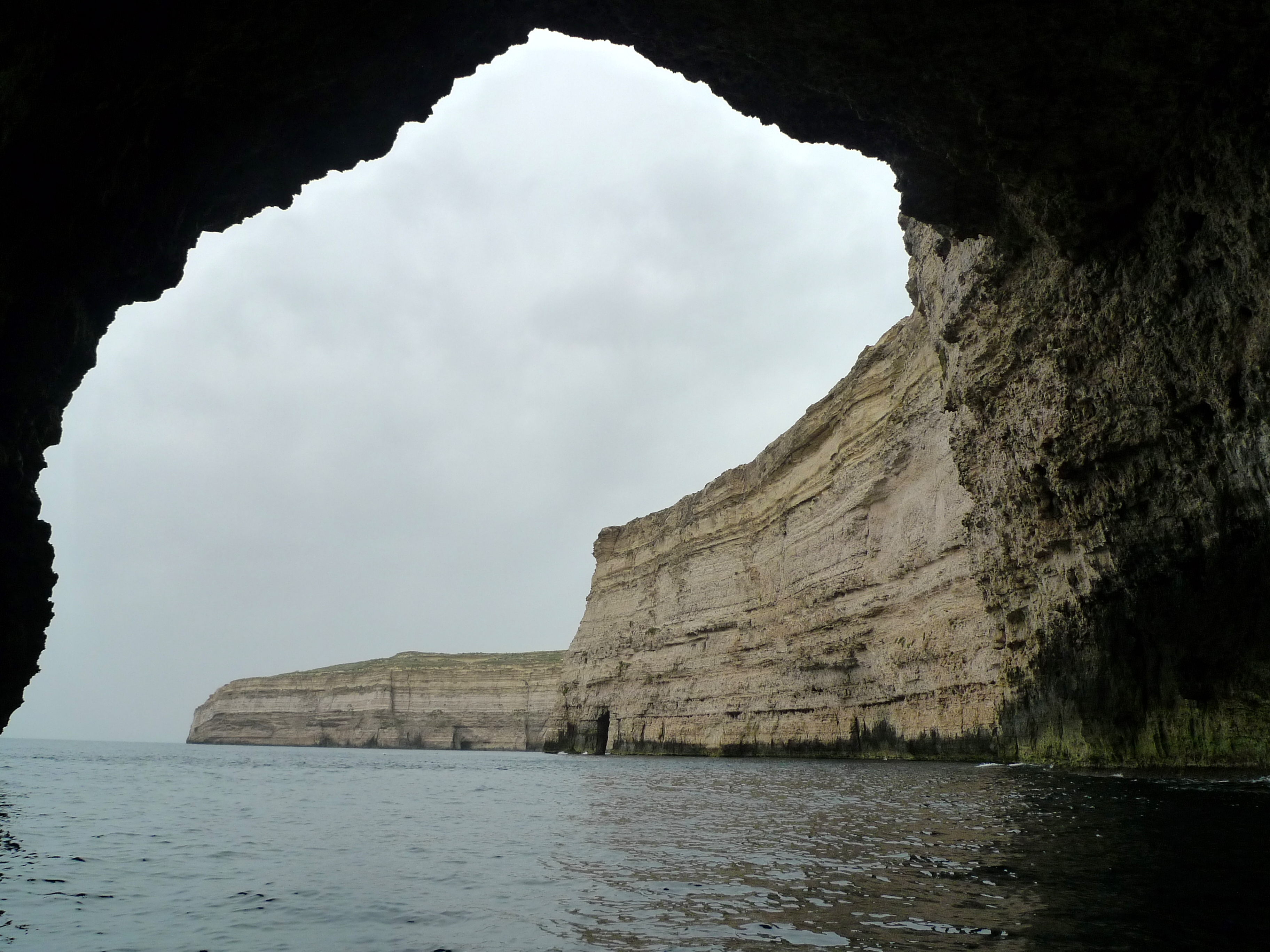 Dwejra Bay, Gozo (Malta).